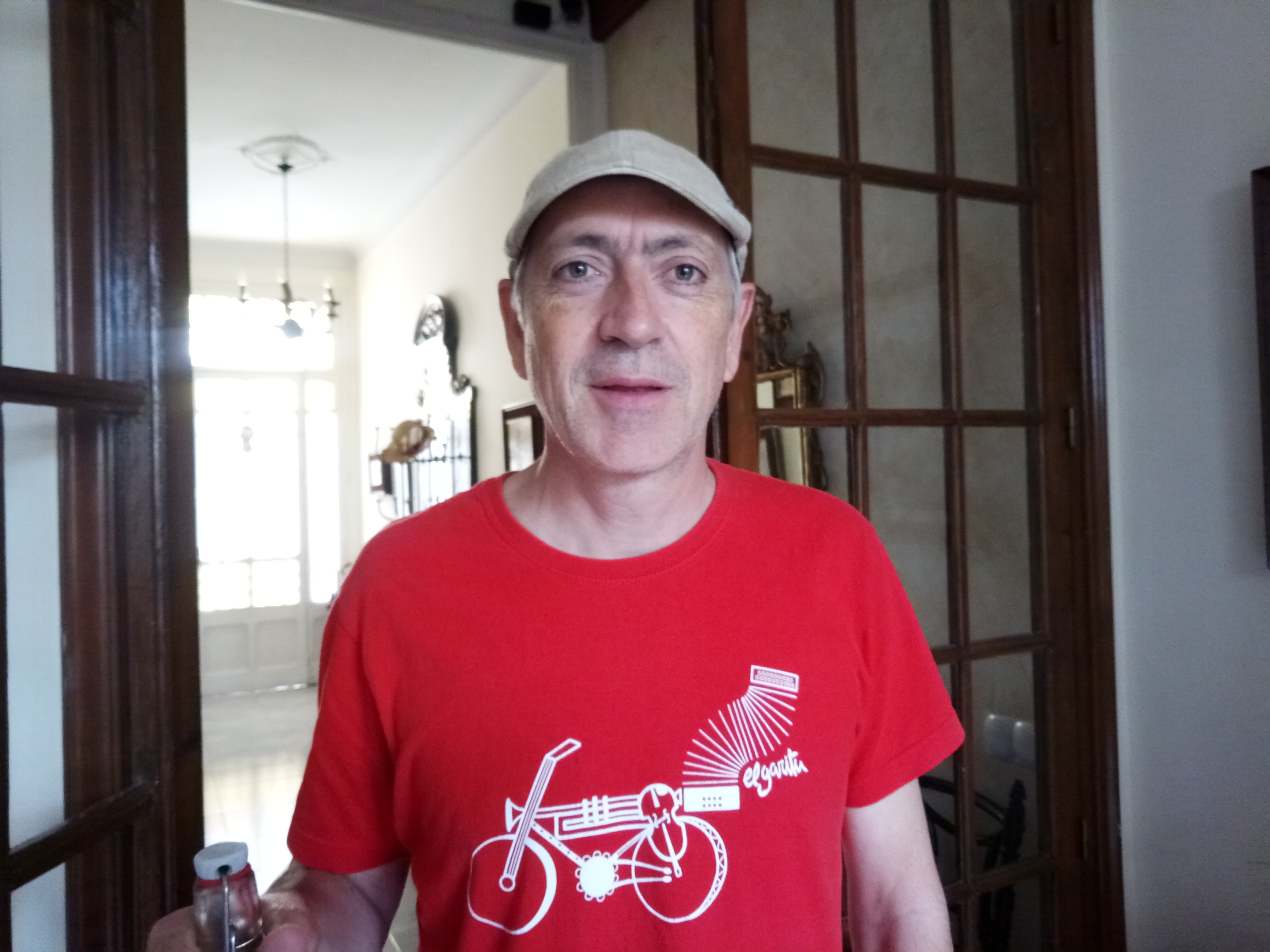 músic i compositor català